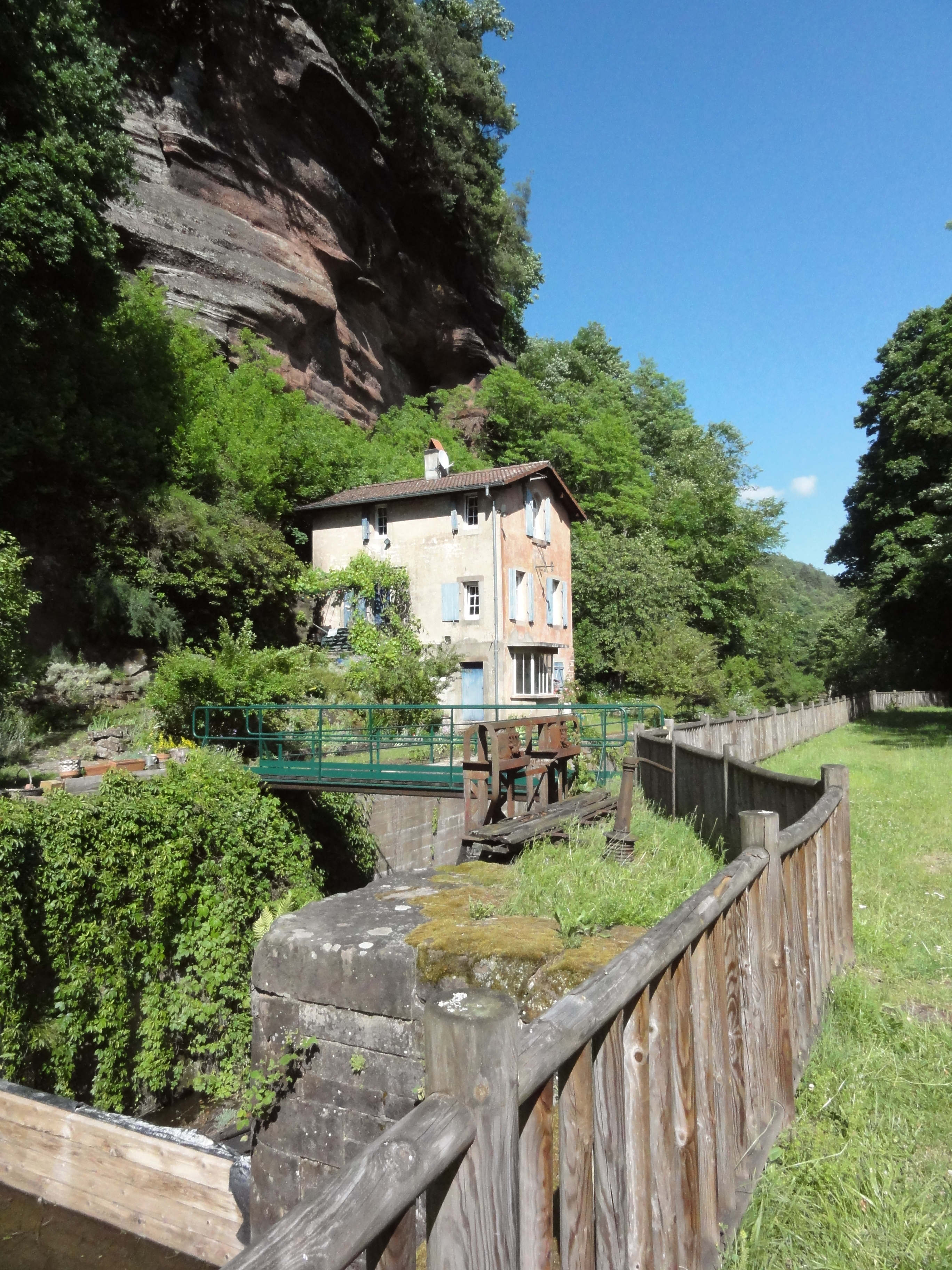 Henridorff (Moselle) écluse dans Vallée des éclusiers (B)